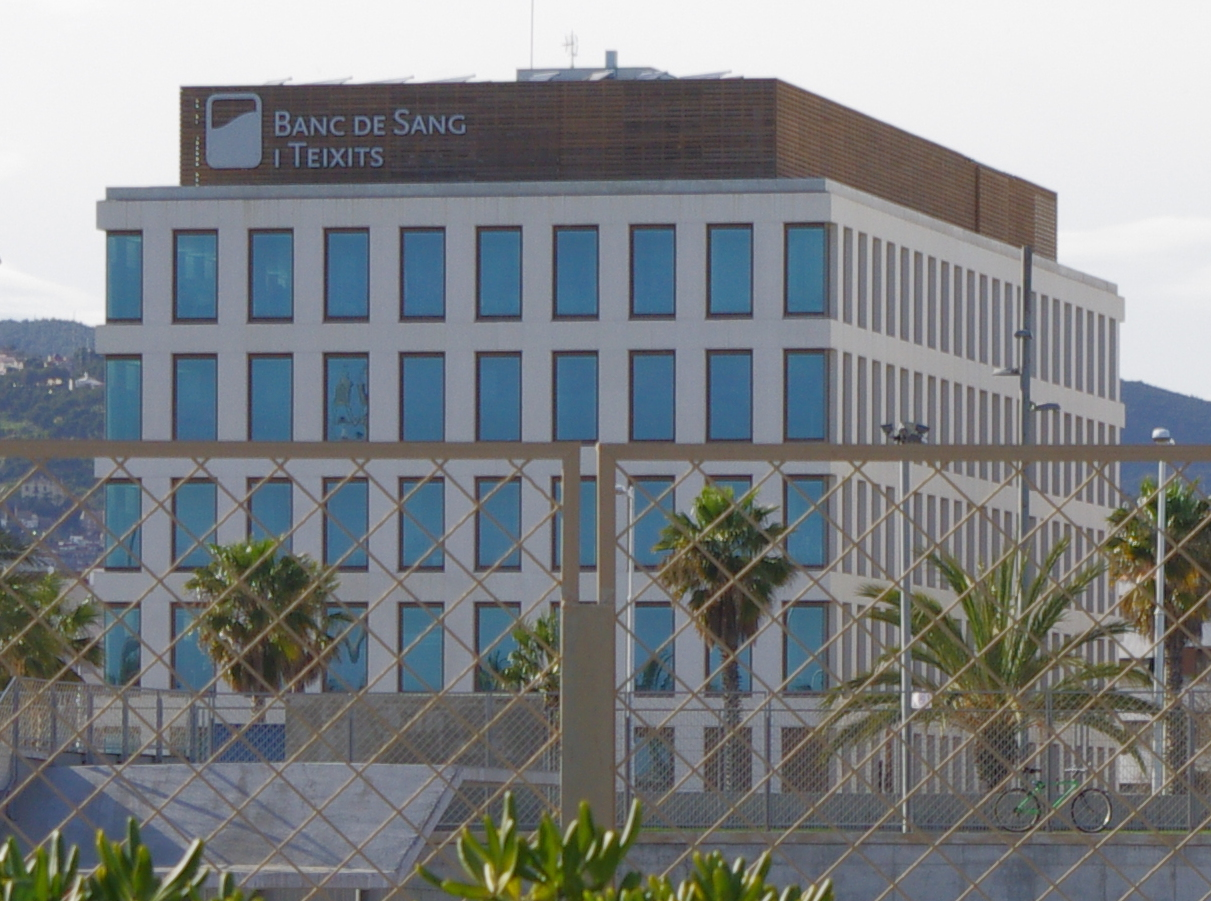 Edifici del Banc de Sang i Teixits de Barcelona, al barri del Poblenou.